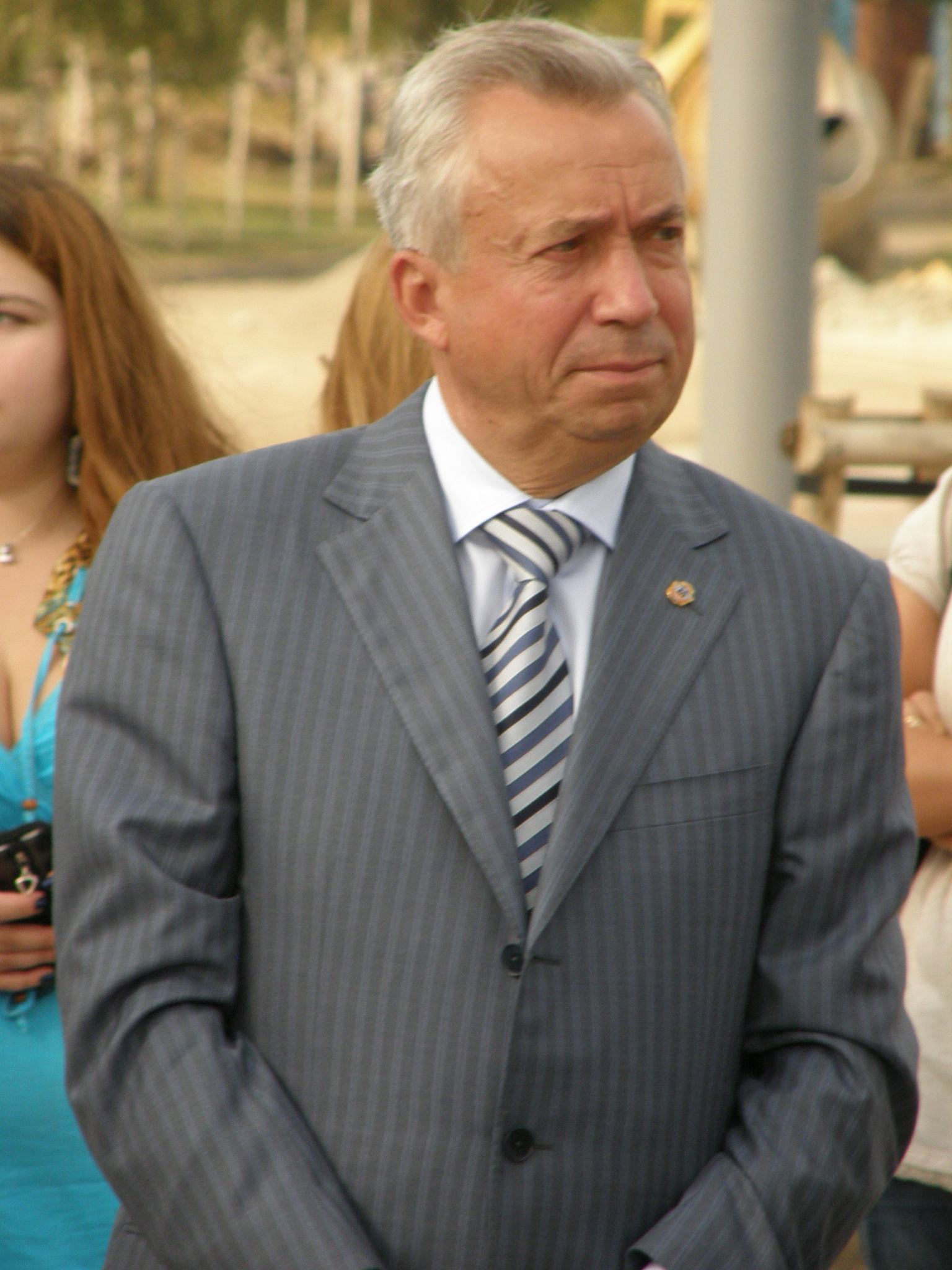 Открытие моста дружбы на 12 кузнечном фестивале в Донецке